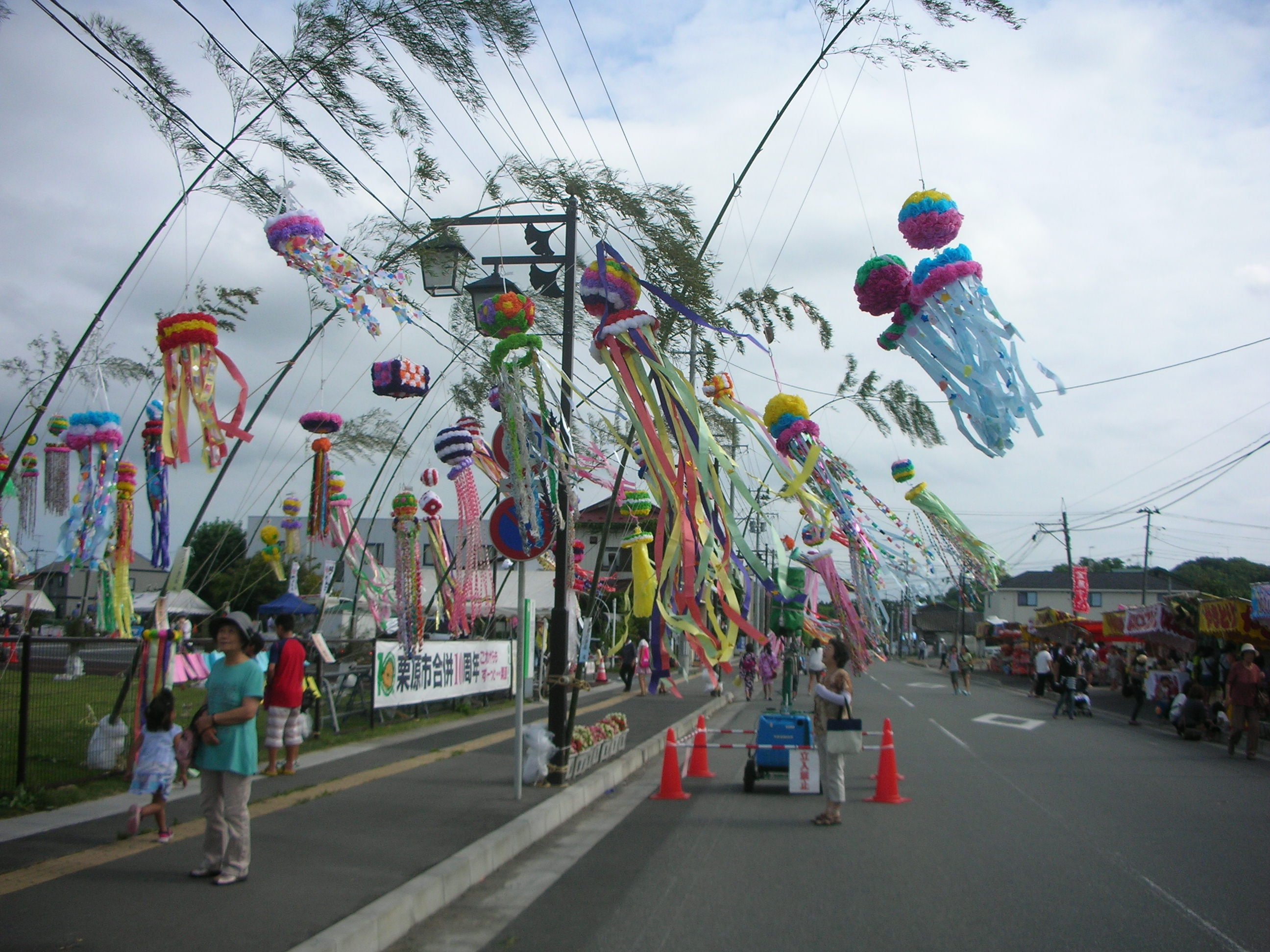 つきだて七夕まつり